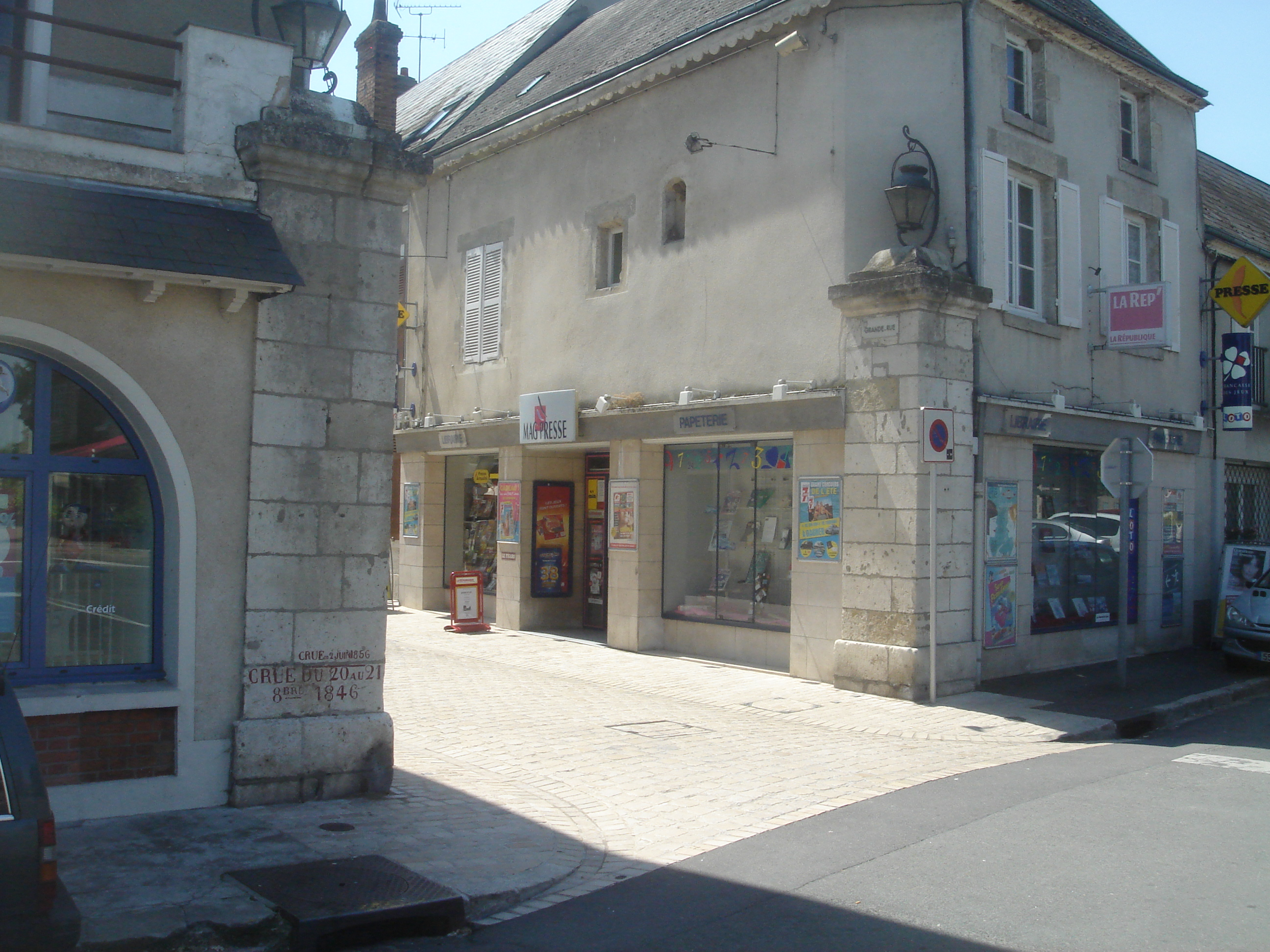 Ancienne porte entrée nord, boulevard Jeanne d'Arc, Jargeau, Loiret, France